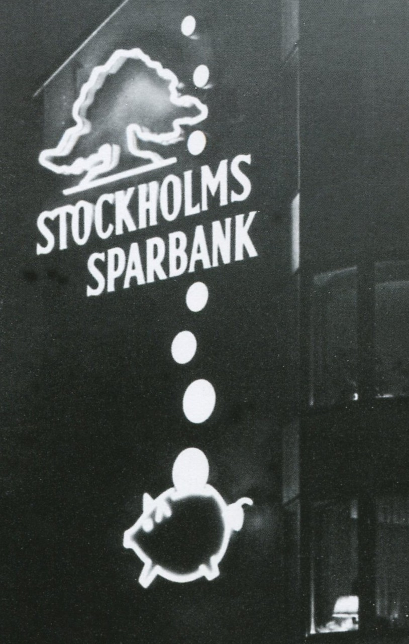 Stockholms Sparbanks kända ljusreklam på Gullmarshuset vid Gullmarsplan i Stockholm